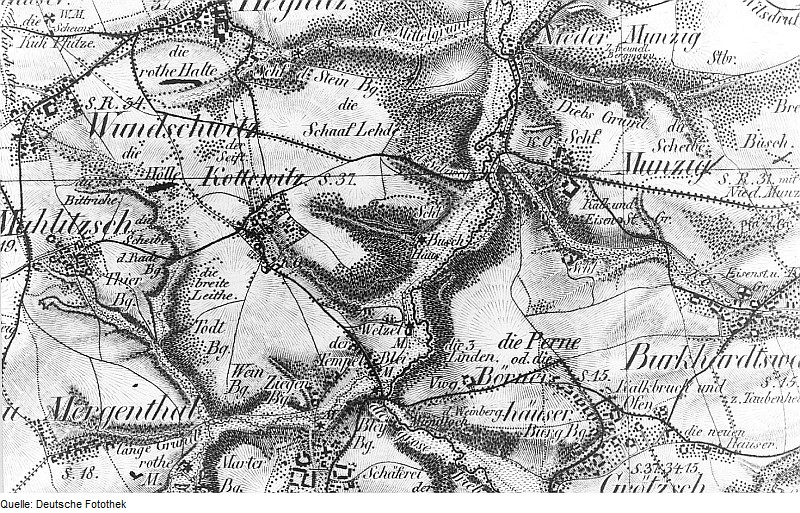 Original image description from the Deutsche Fotothek Nossen-Kottewitz. Buschhaus, Ausschnitt aus: Oberreit, Sect. Freiberg, vor 1843